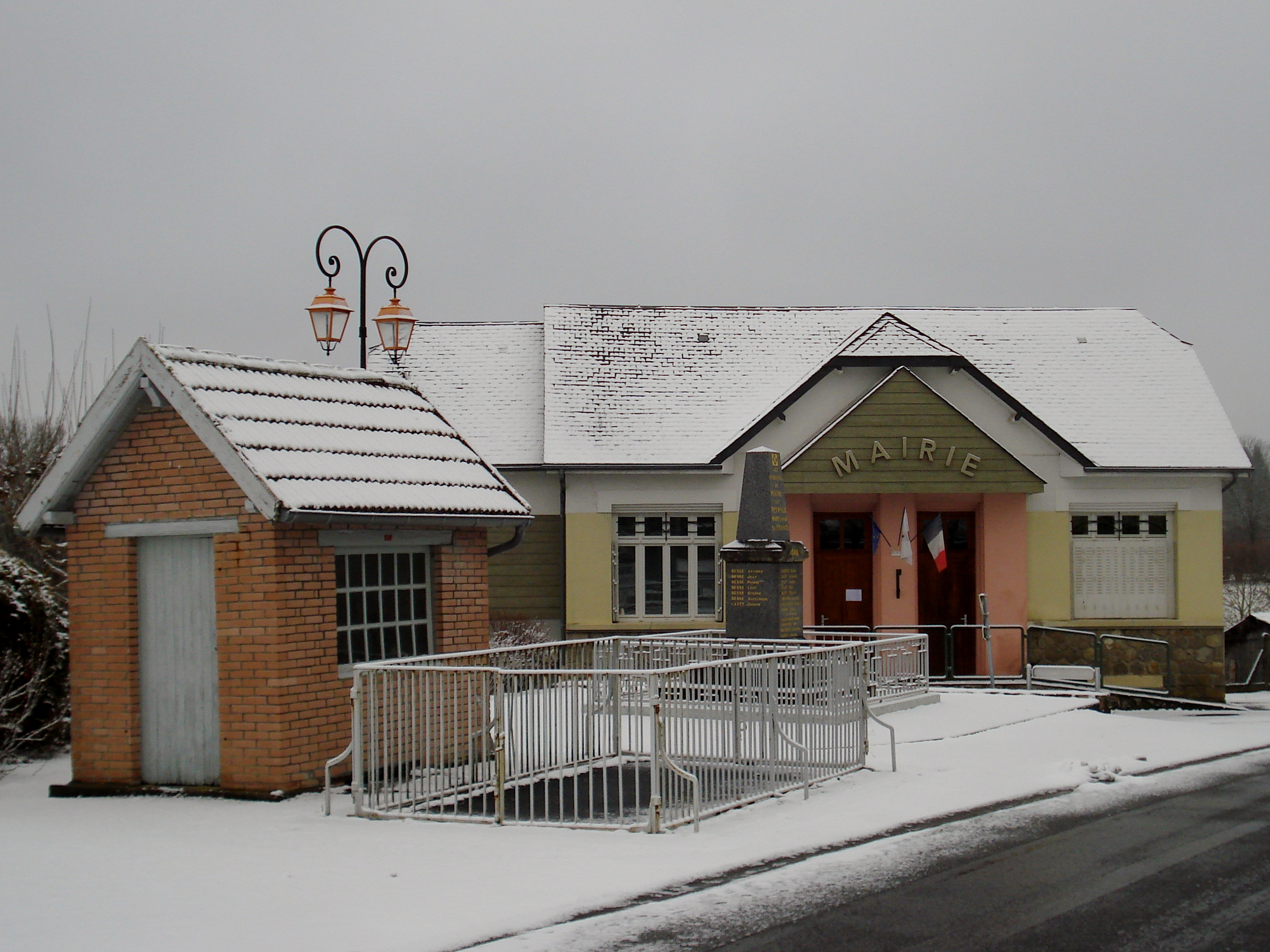 La mairie de Roche-le-Peyroux